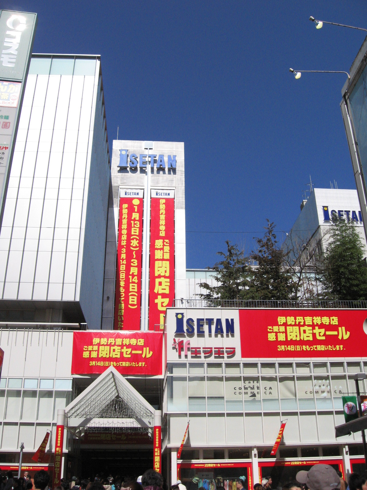 伊勢丹吉祥寺店閉店当日のF&Fビル(東京都武蔵野市吉祥寺)。2006年12月の画像と同じアングルで撮影。